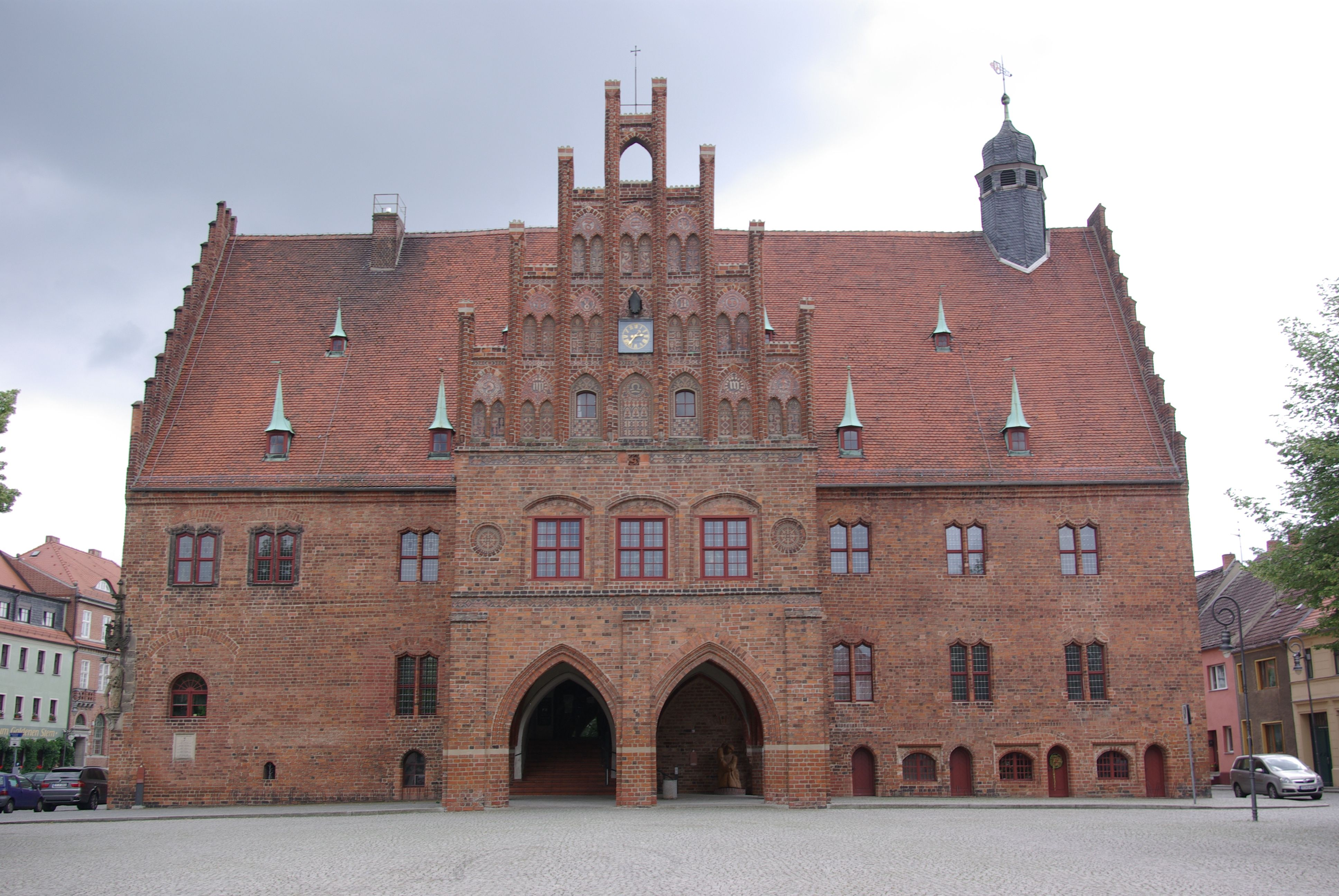 Jüterbog in Brandenburg. Das Rathaus wurde ca. um 1500 erbaut.Das Rathaus steht unter Denkmalschutz